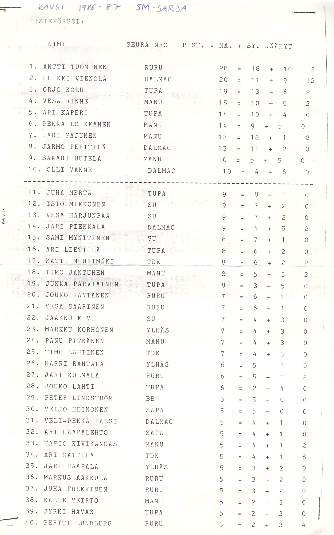 Pistepörssin ensimmäinen sivu